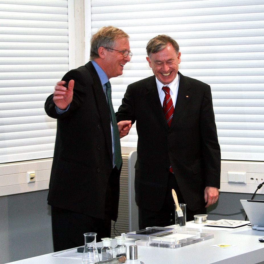 Michael Veith im Gespräch mit Horst Köhler